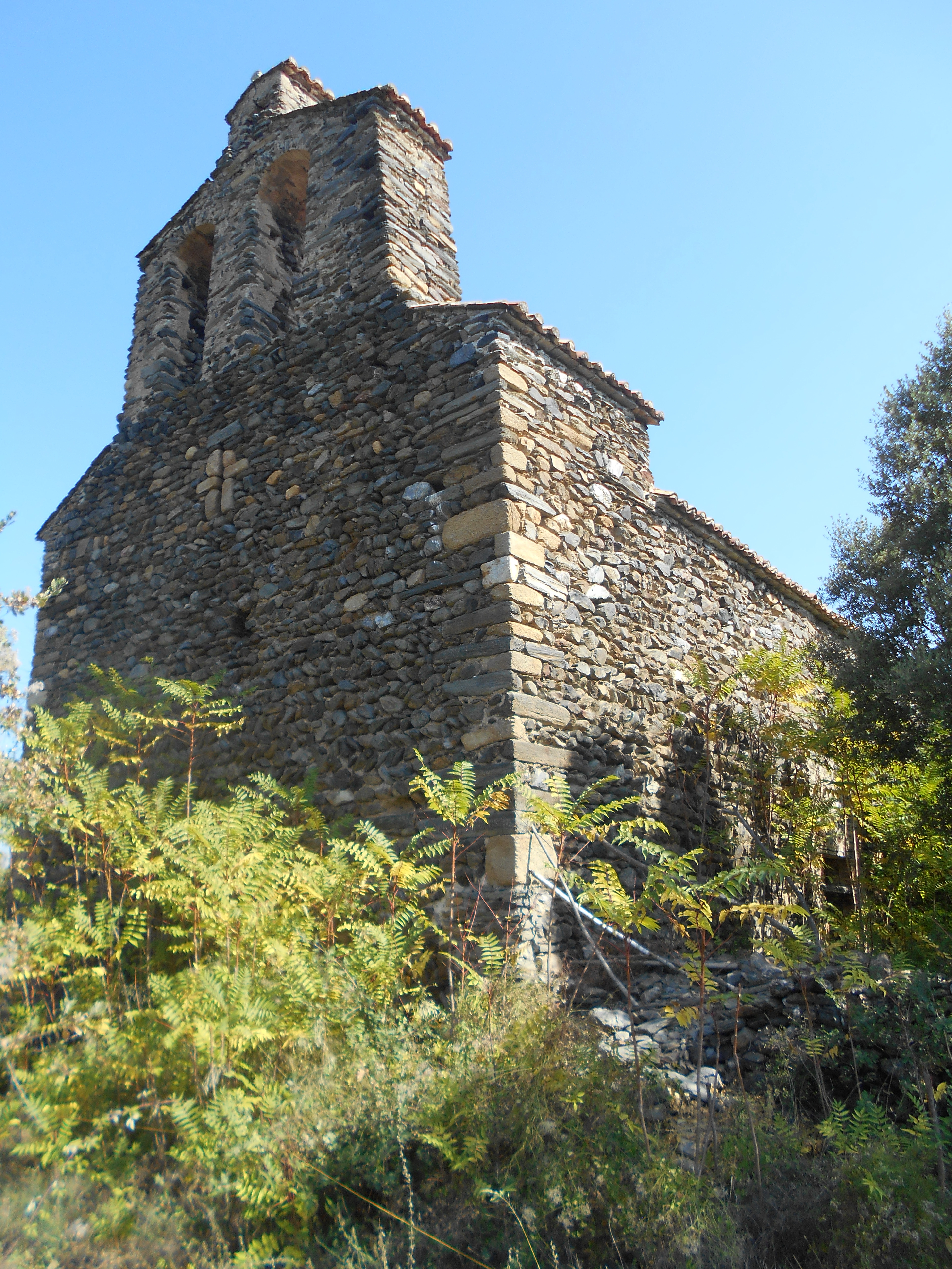 Antiga església parroquial de Santa Eulàlia de Vilella. Façana occidental